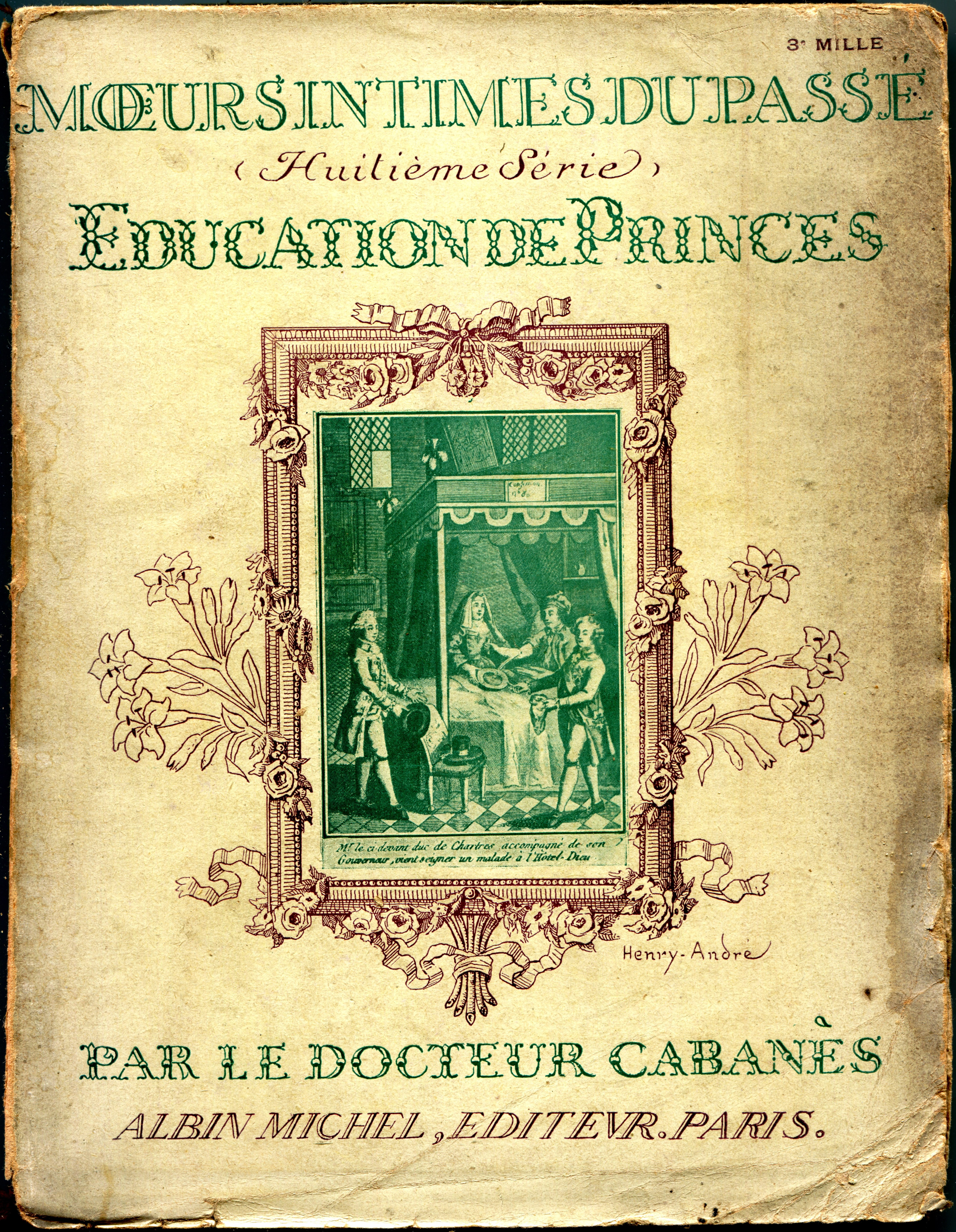 Mœurs intimes du Passé - Huitième série, Éducation de Princes par le Docteur Cabanès, Albin Michel, Éditeur, Paris. 3e mille. 1ère de couverture.